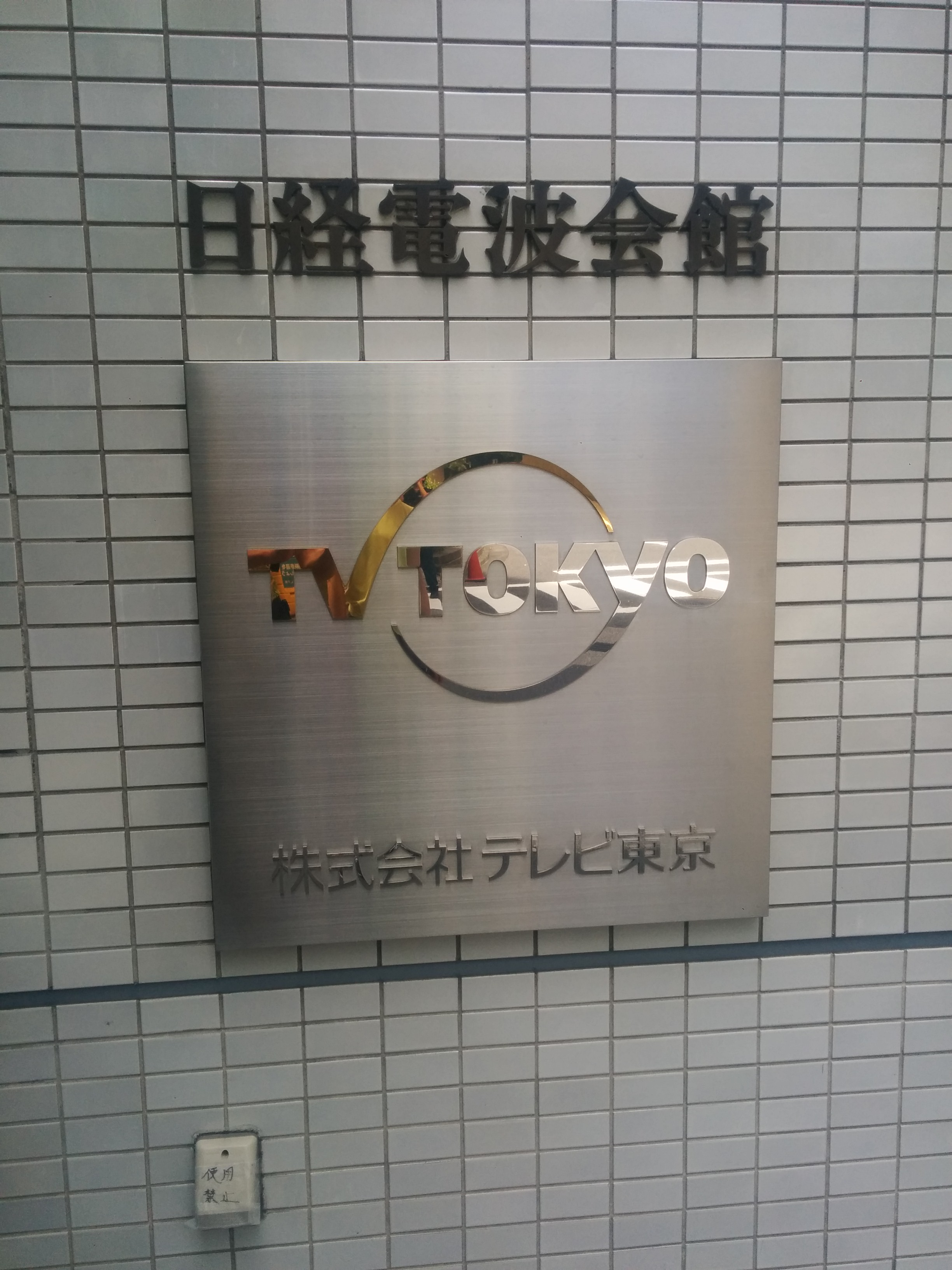 Besides entrance